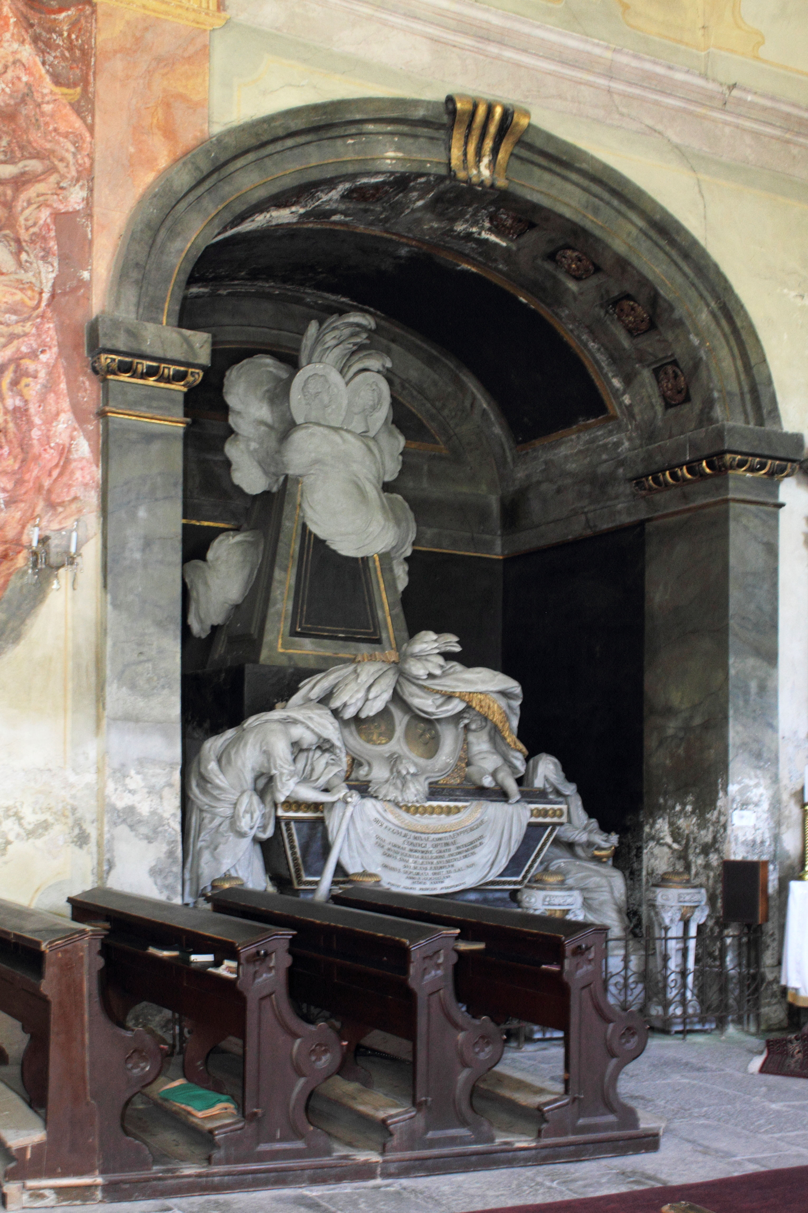 Hrobka v interiéru kostela ve Žlebech. Hrobku nechal vybudovat Jan Adam Auersperg pro svoji ženu Marii Wilhelminu, rozenou Neipperg (uprostřed je alianční erb manželů tvořící stylizovanou lebku - pravé oko auersperský štít, levé oko neipperský štít).